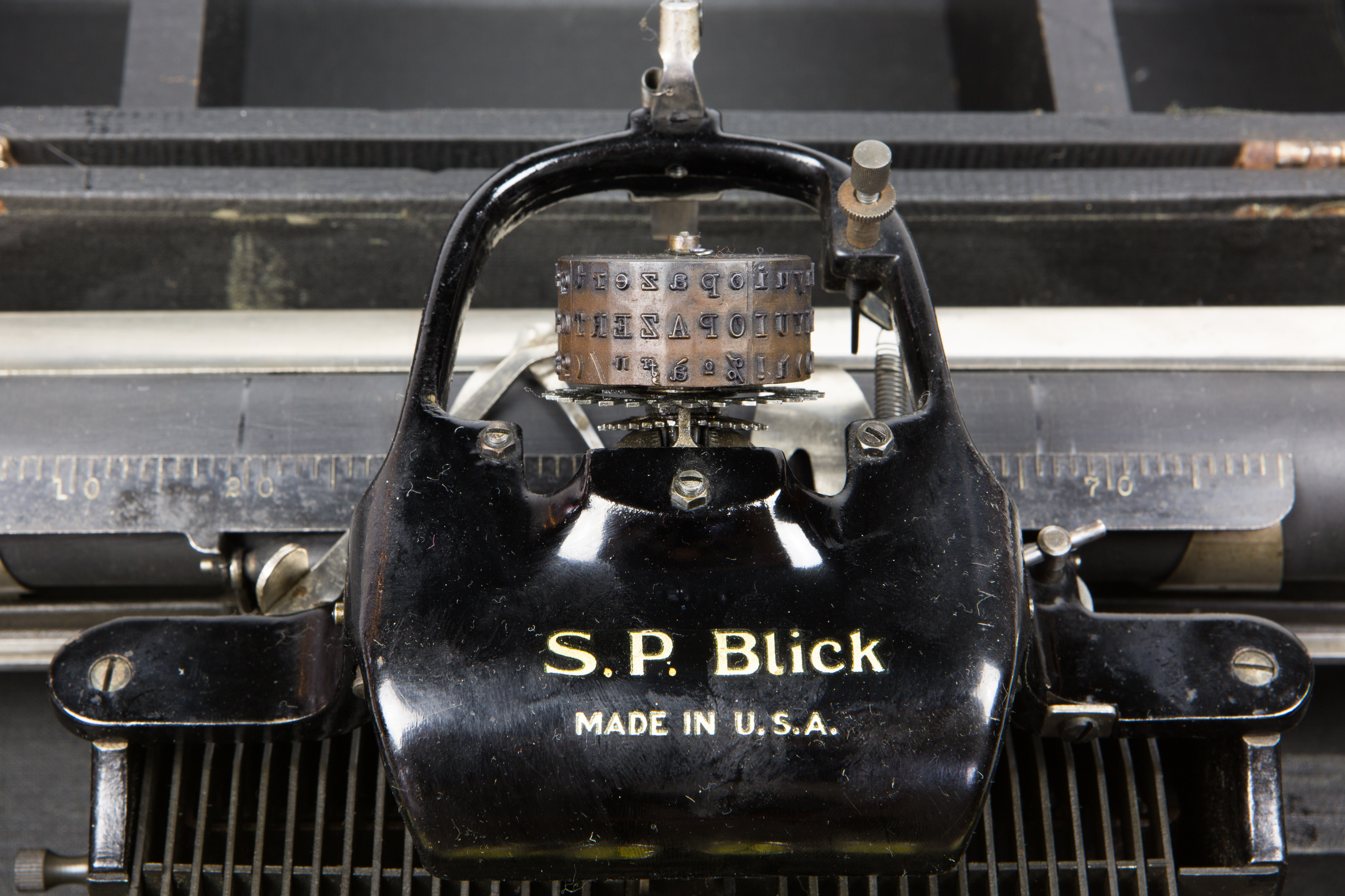 Machine à écrire Blick - fabriquée en 1900